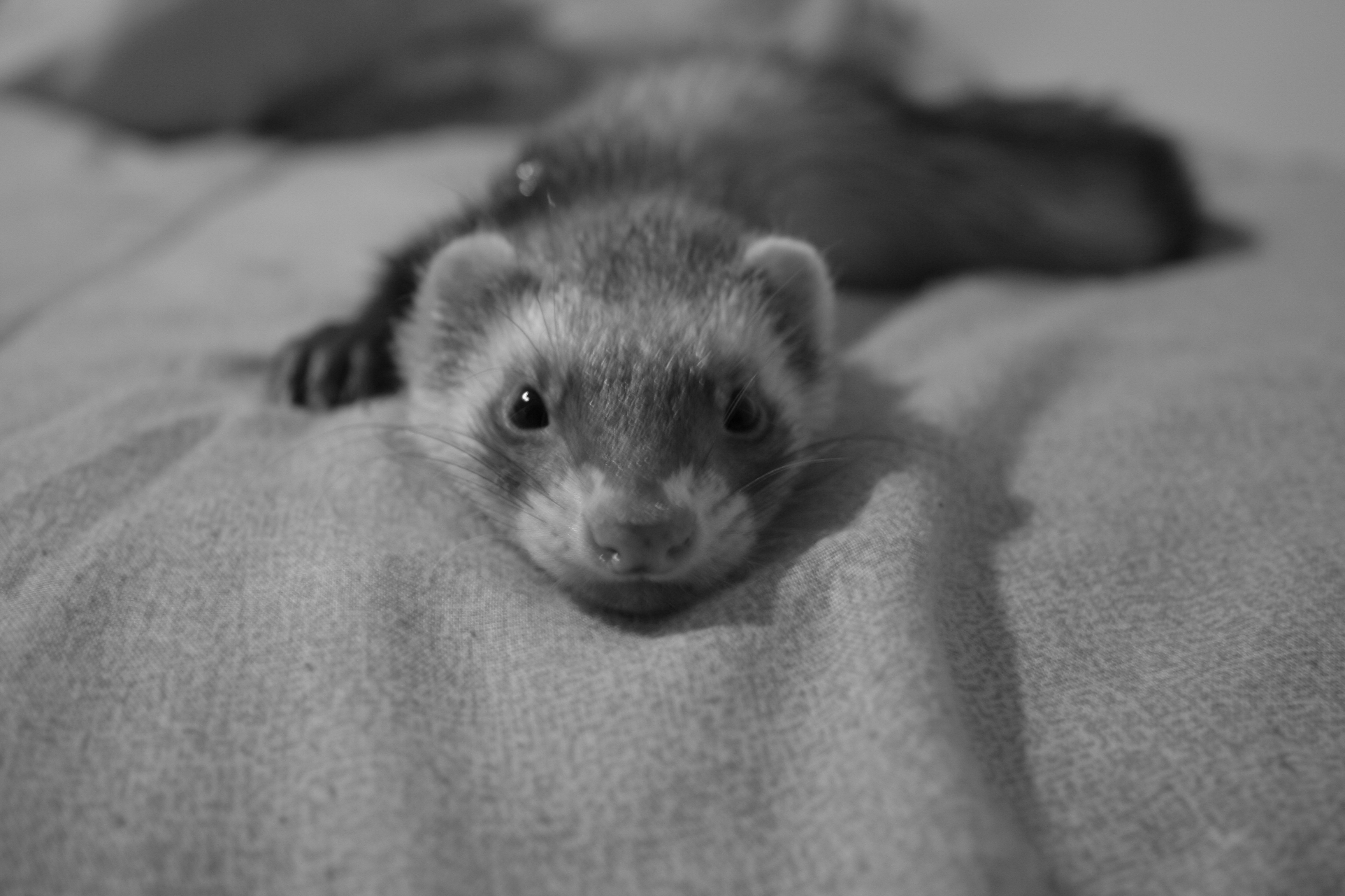 Hurón enfermo.